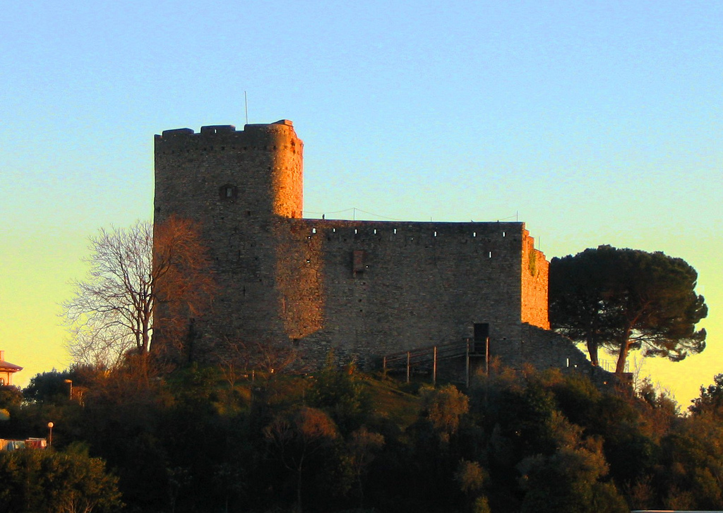 Il castello di Chiavari, Liguria, Italy